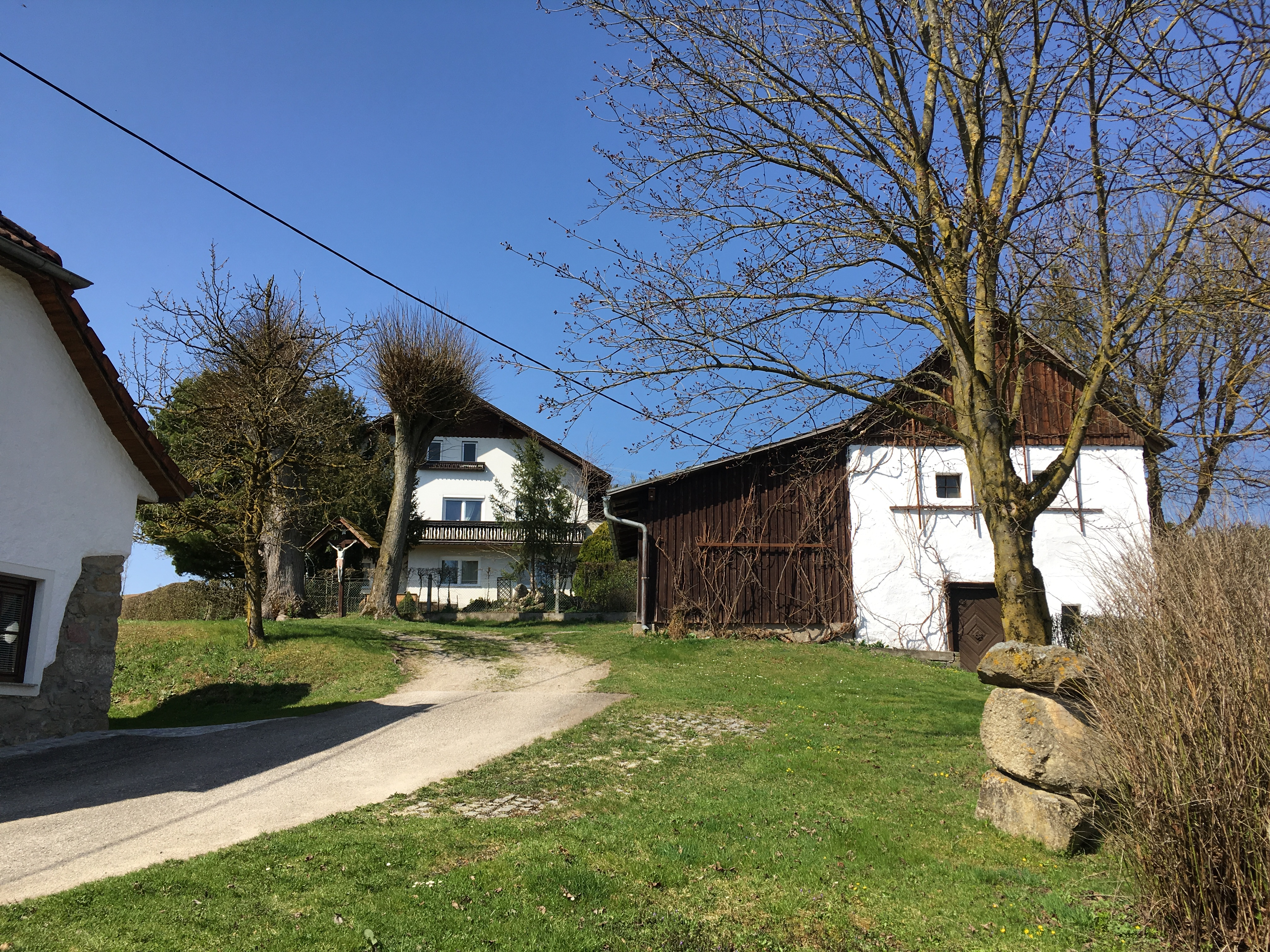 Kirche Hofkirchen bei Saxen, von links nach rechts: Lehrerhaus, Kreuz an der Stelle des Turms, Mesnerhaus, Gruft unter der Sakristei.JPG